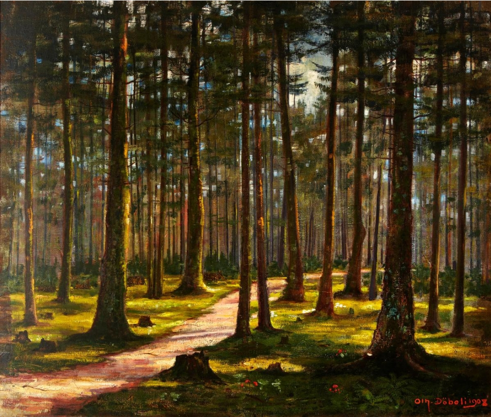 Waldpartie. Signiert und datiert unten rechts Oth. Döbeli 1908. Öl auf Karton. 102 x 122 cm